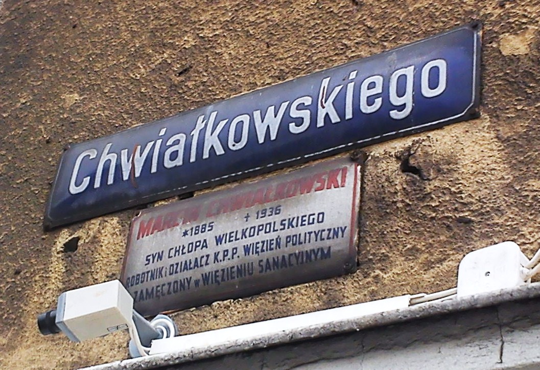 Poznań, ul. Chwiałkowskiego. Stara tabliczka.